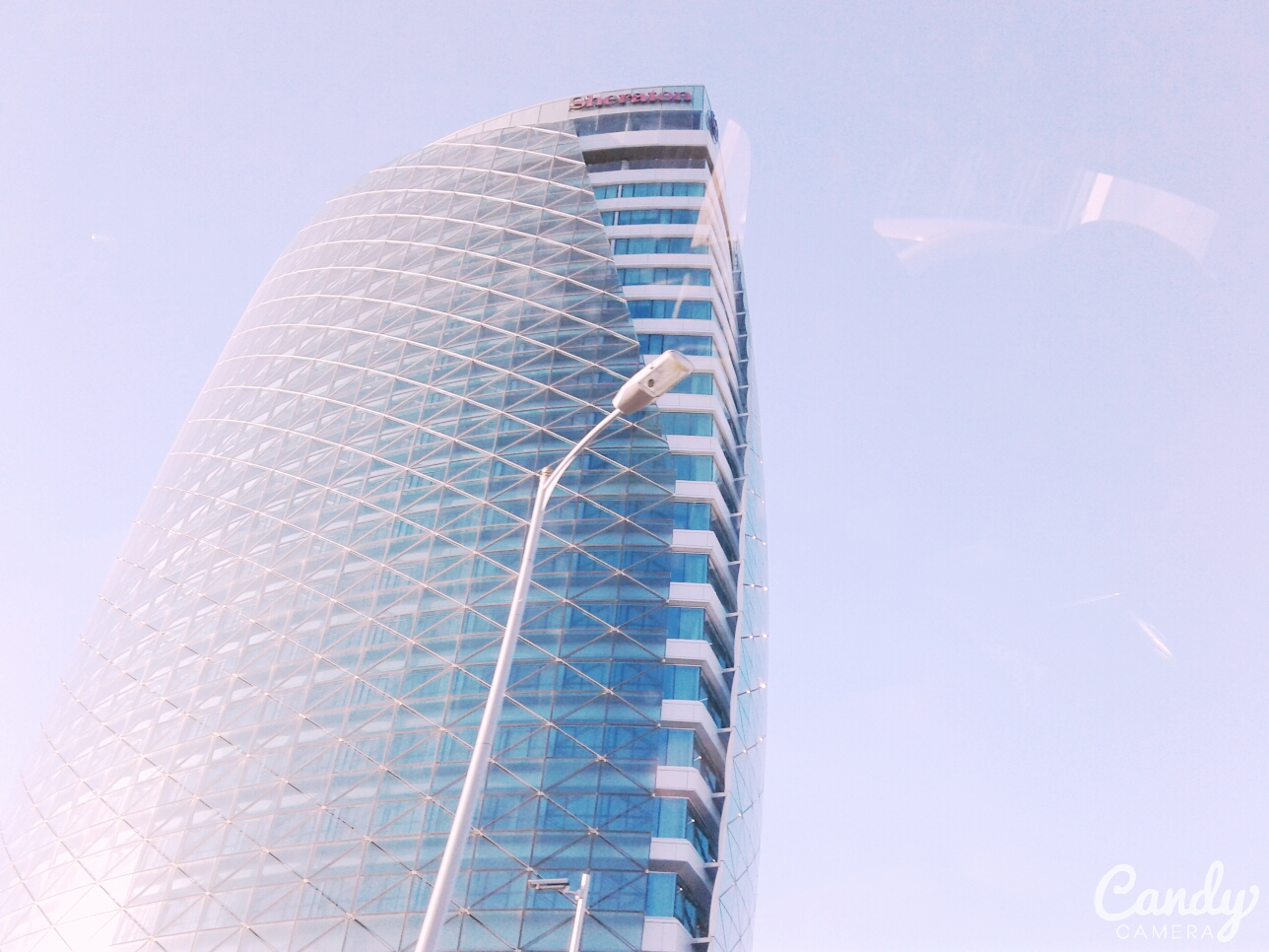 جميل و مبهر